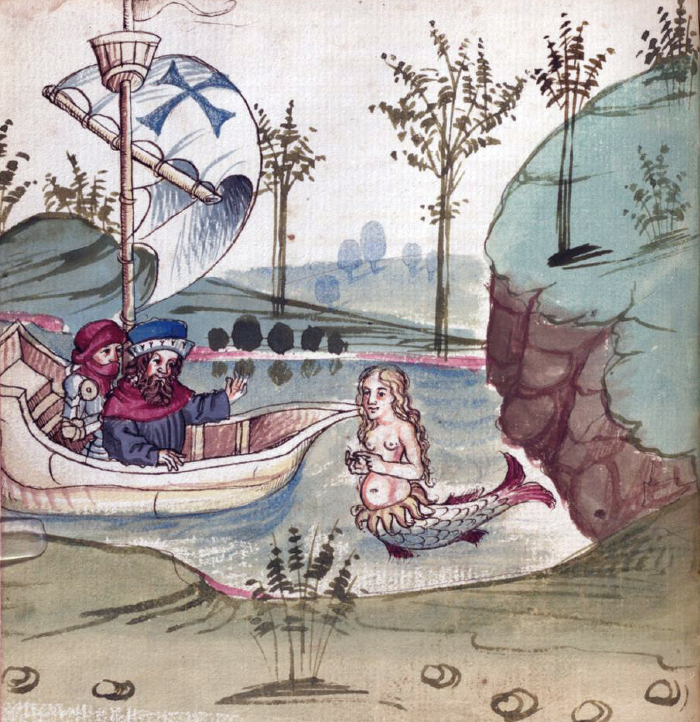 Bild aus der Handschrift "Salman und Morolf" von Hans Dirmstein, Frankfurt am Main 1479